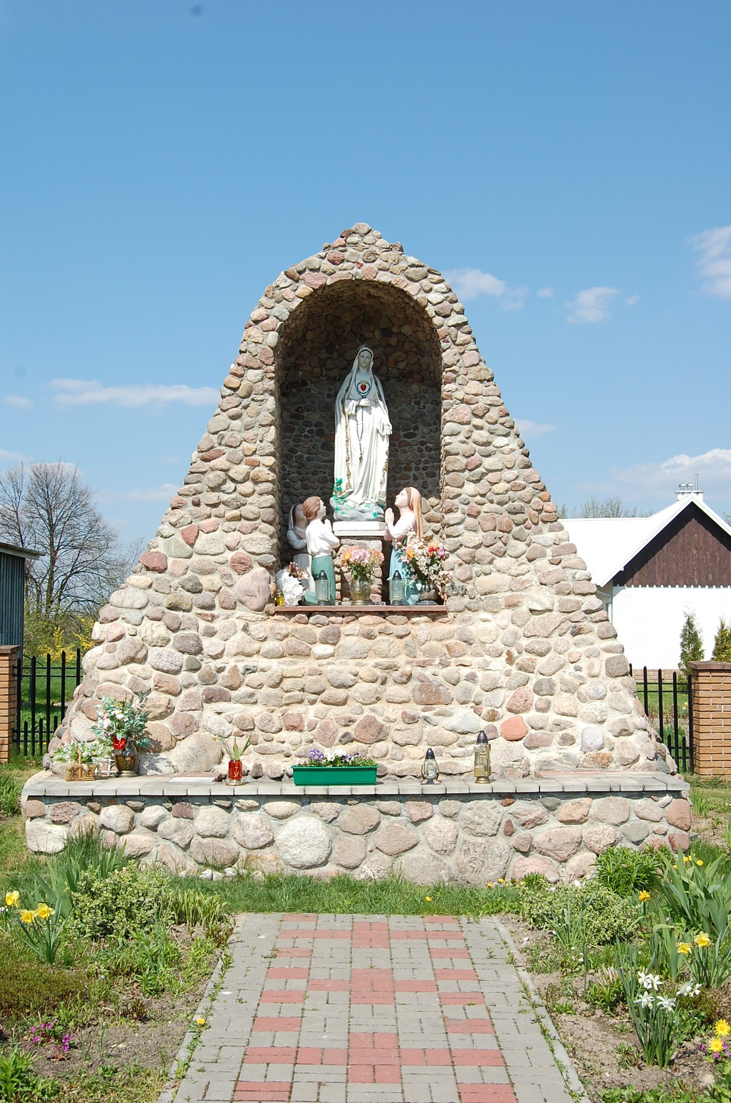 Kapliczka przy kościele w Motyczu